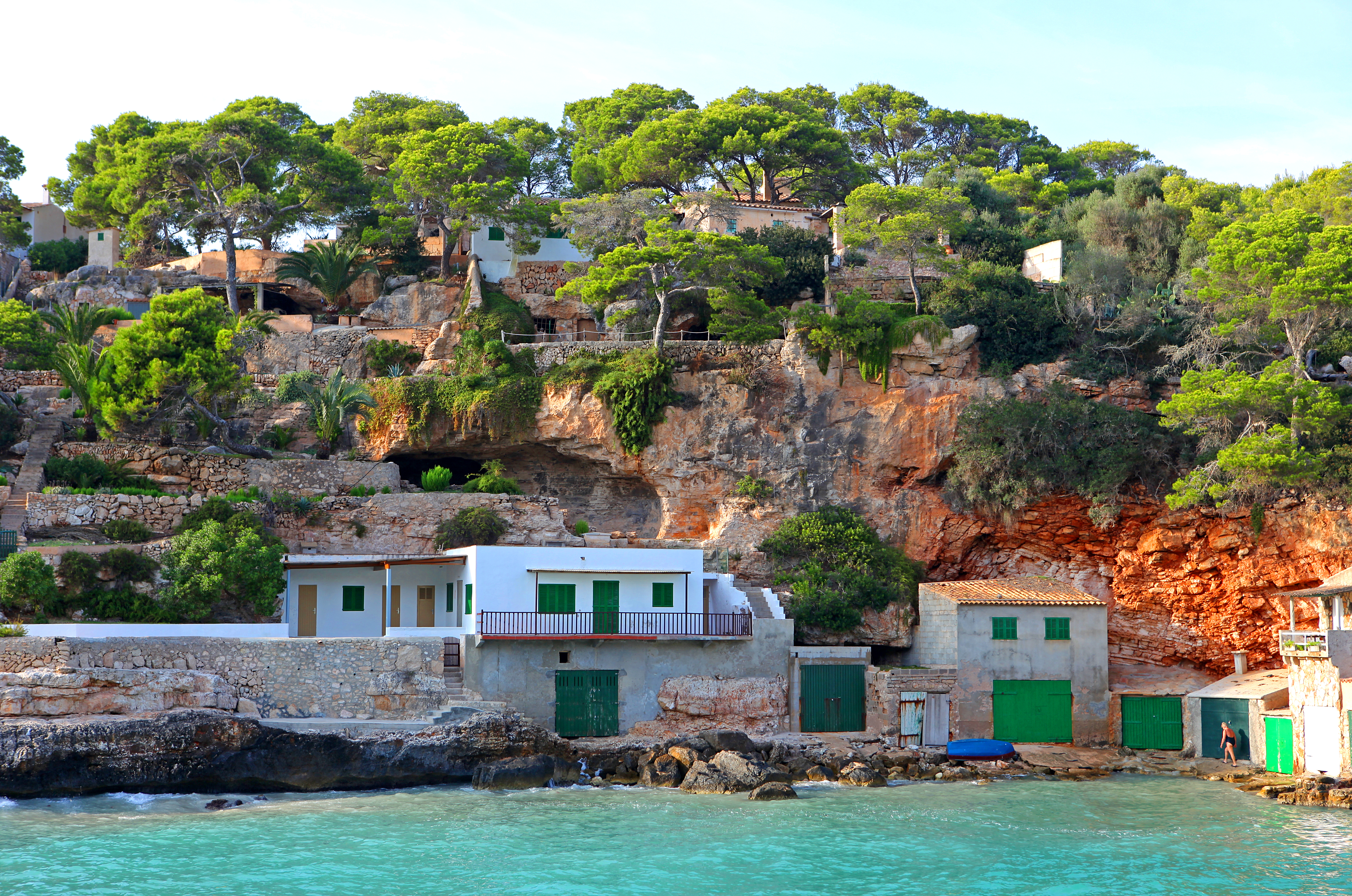 Playa Es Fori, Mallorca, Spain 2009